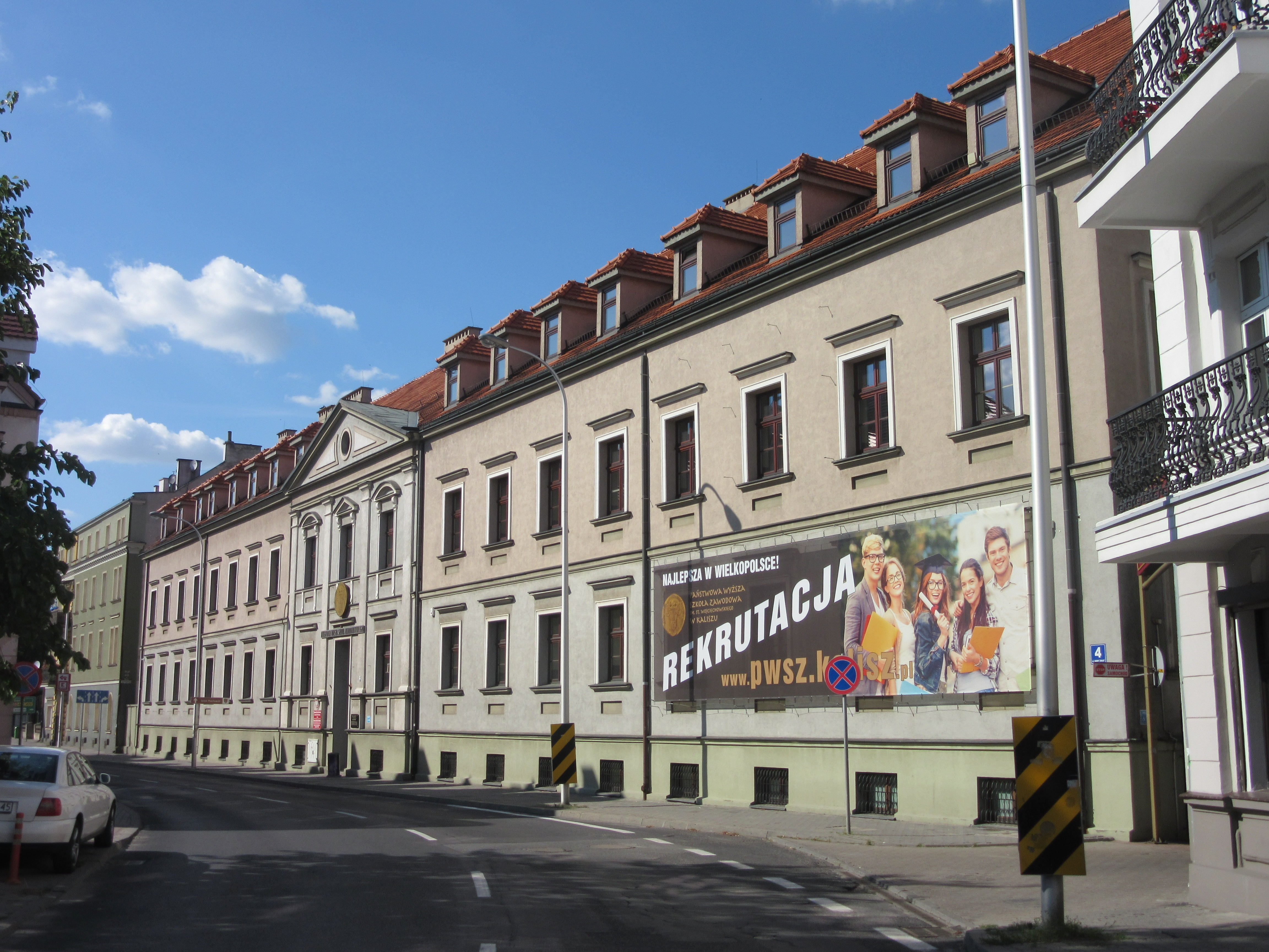 Gmach główny Państwowej Wyższej Szkoły Zawodowej w Kaliszu